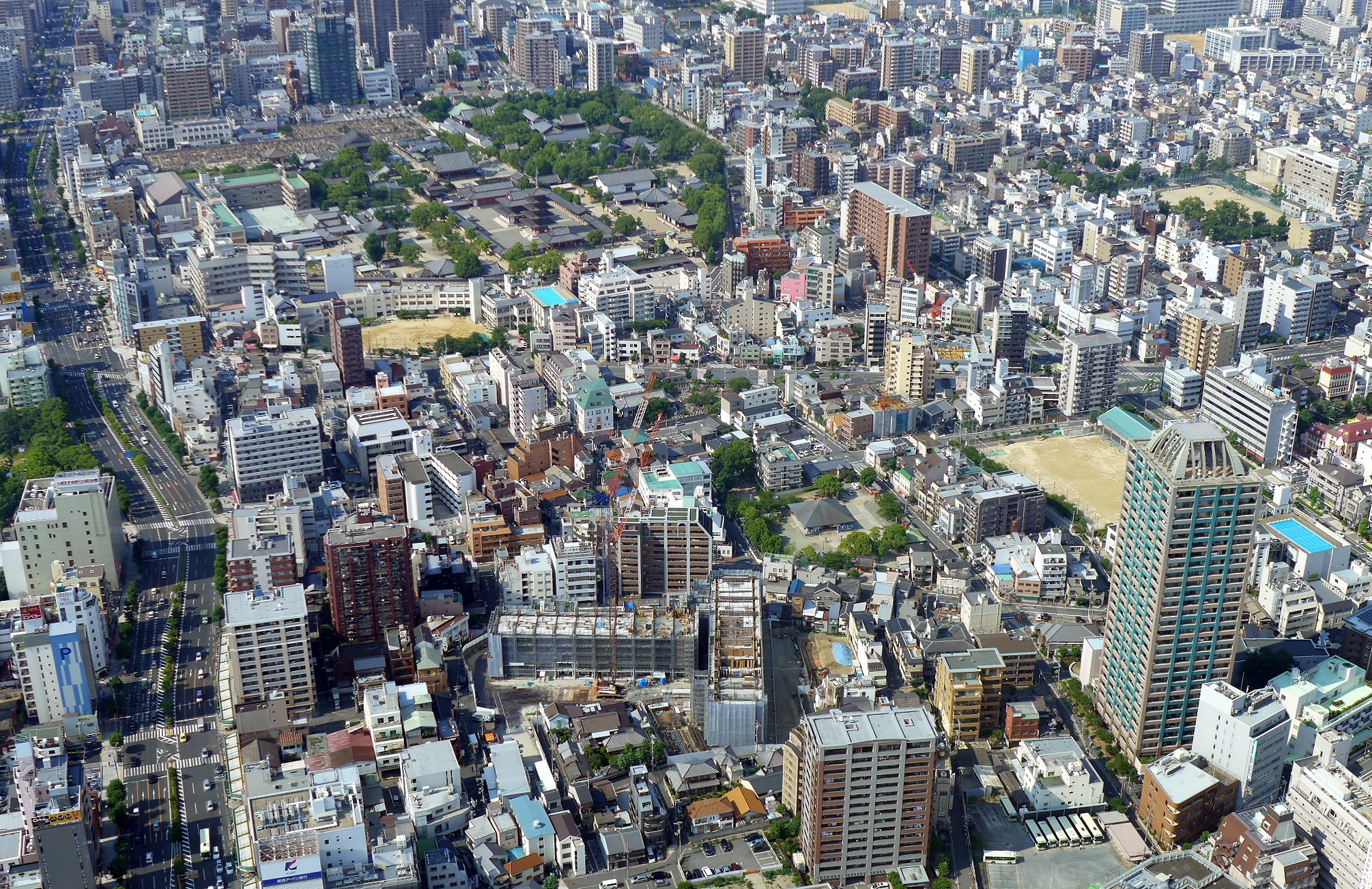 Tennoji-ku Buildings